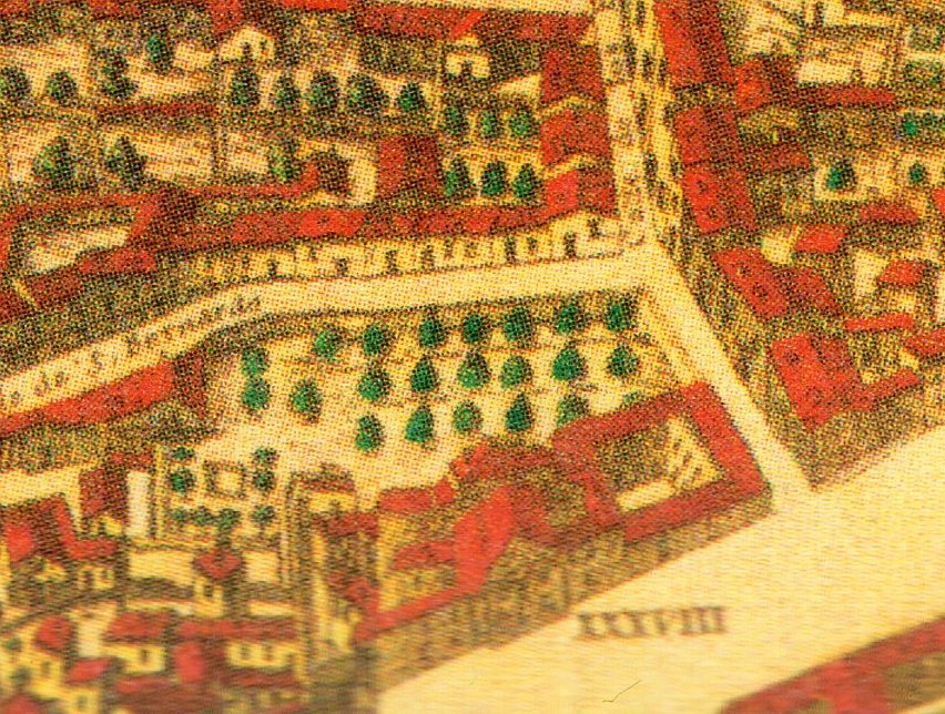 Topografía de la Villa de Madrid descrita por Don Pedro Texeira en 1656, en la cual se demuestran todas las calles al largo y ancho de cada una de ellas, las rinconadas y lo que tuercen las Plazas, fuentes, jardines y huertas con la disposición que tienen las parroquias, Monasterios y Hospitales están señalados sus nombres con letras y números que se hallaran en la tabla y los demás edificios, torres y delanteras de las casas de la parte que mira al Mediodía están sacadas al natural que se podrán tocar las puertas y ventanas de cada una de ellas.